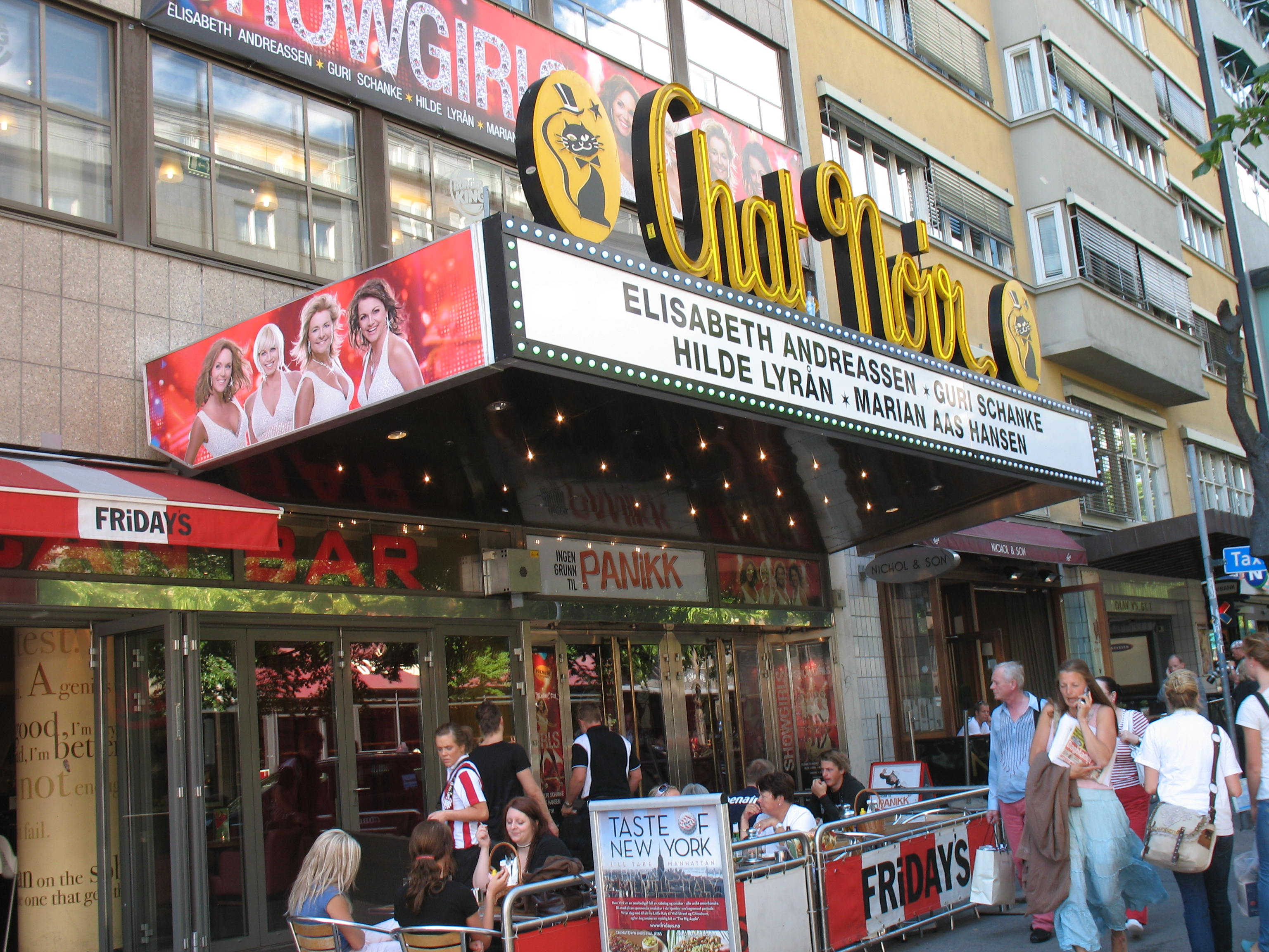 Teateret Chat Noir i Oslo